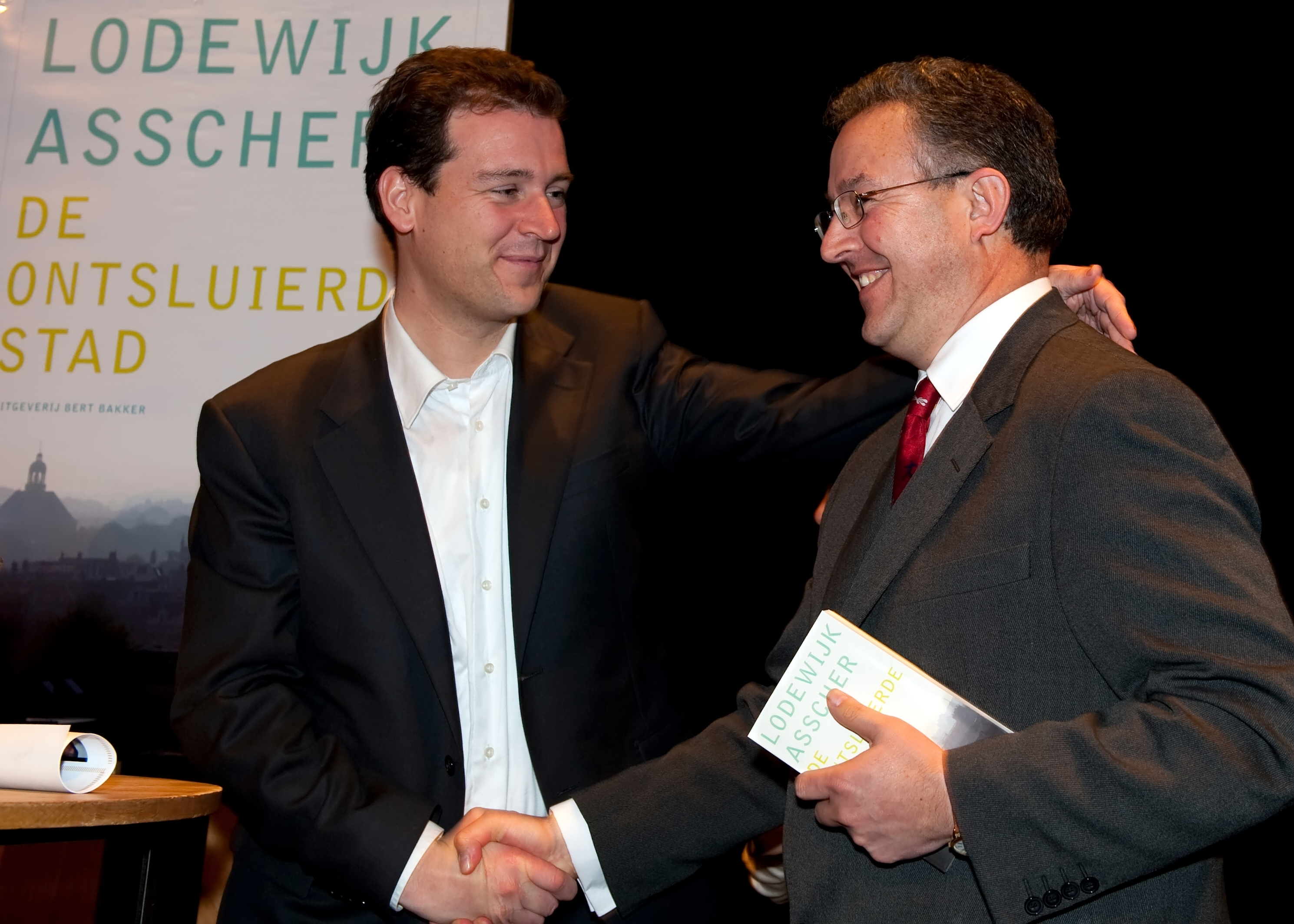 Sinds zaterdag 30 januari ligt het nieuwe boek van Lodewijk Asscher, ´De ontsluierde stad`, in de winkel. Het boek werd op 3 februari gepresenteerd bij Felix Meritis in Amsterdam. zie Het PAROOL